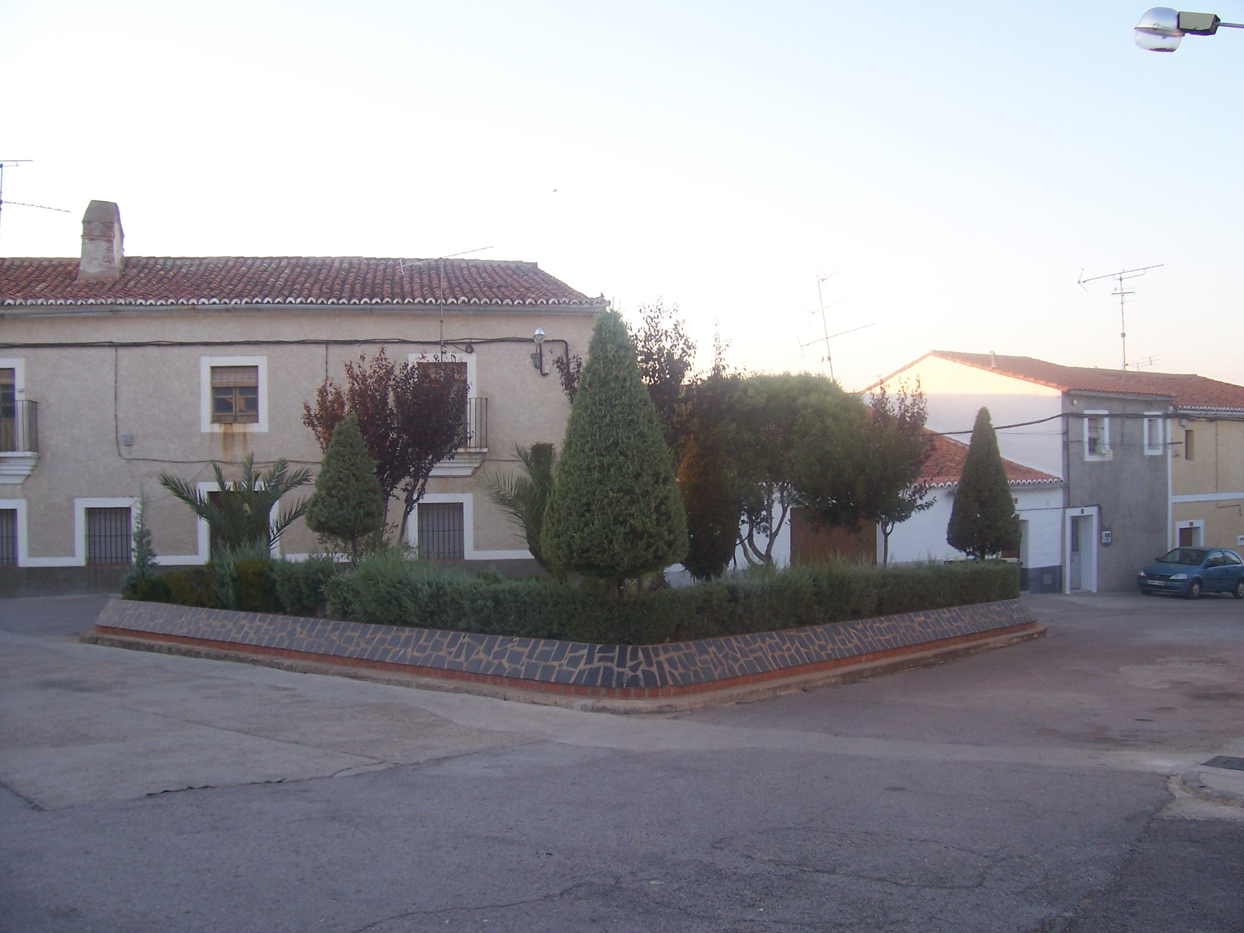 Jardín en Salorino, provincia de Cáceres, España.